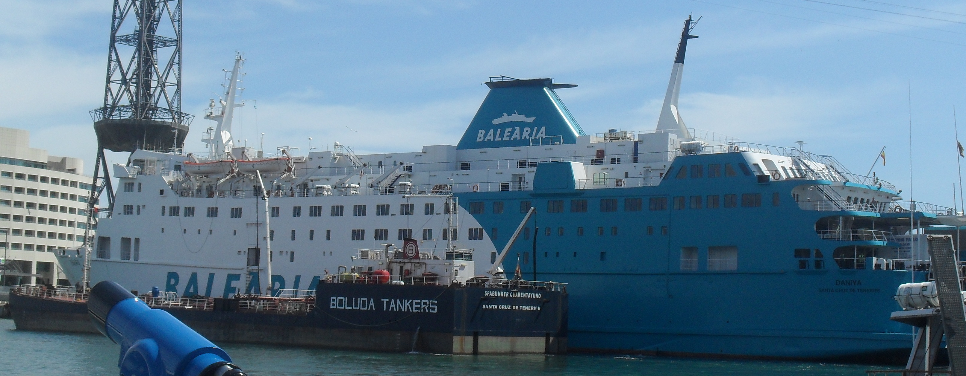 puerto de barcelona